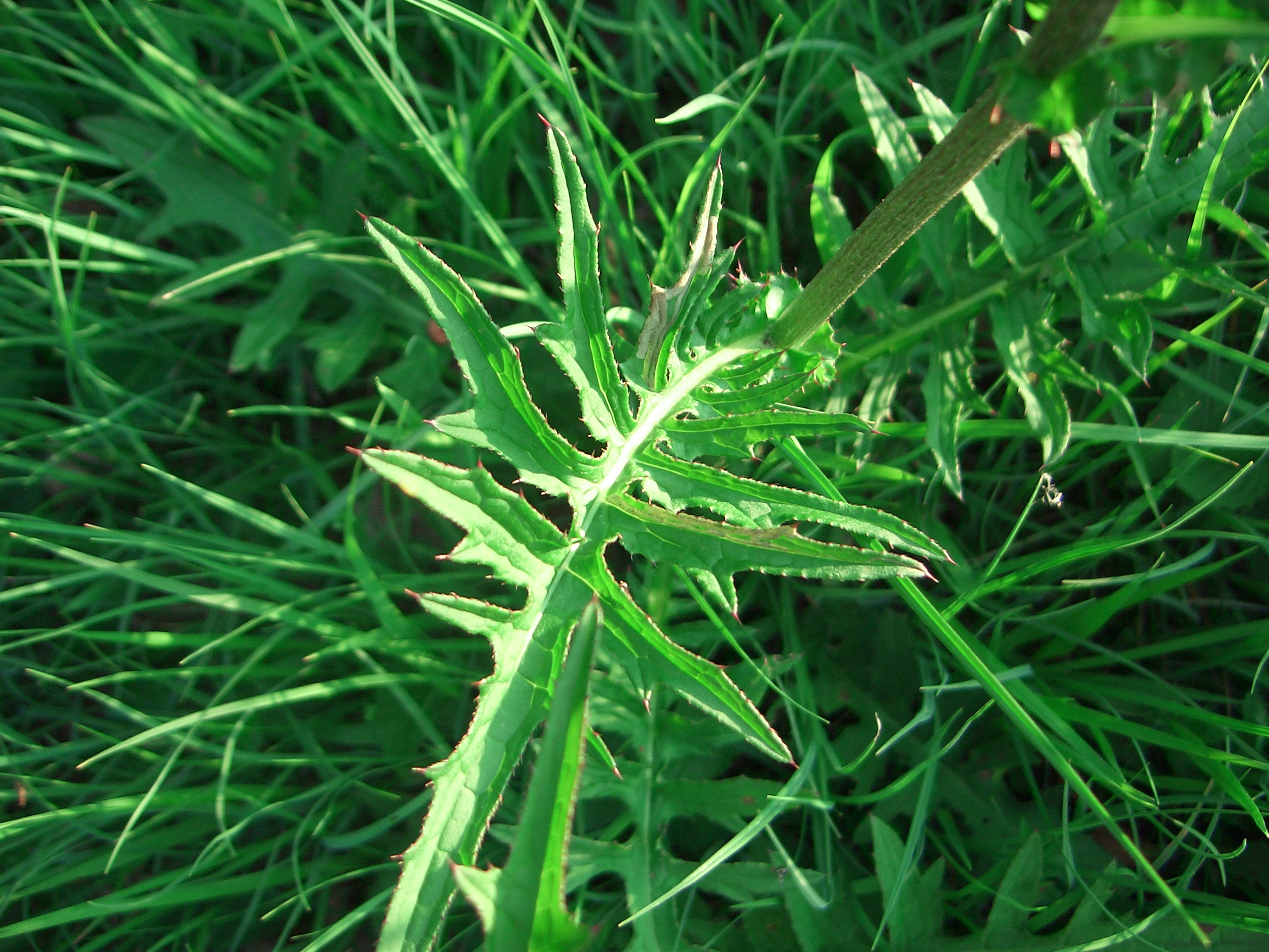 Cirsium rivulare - Bach-Kratzdistel; Blätter